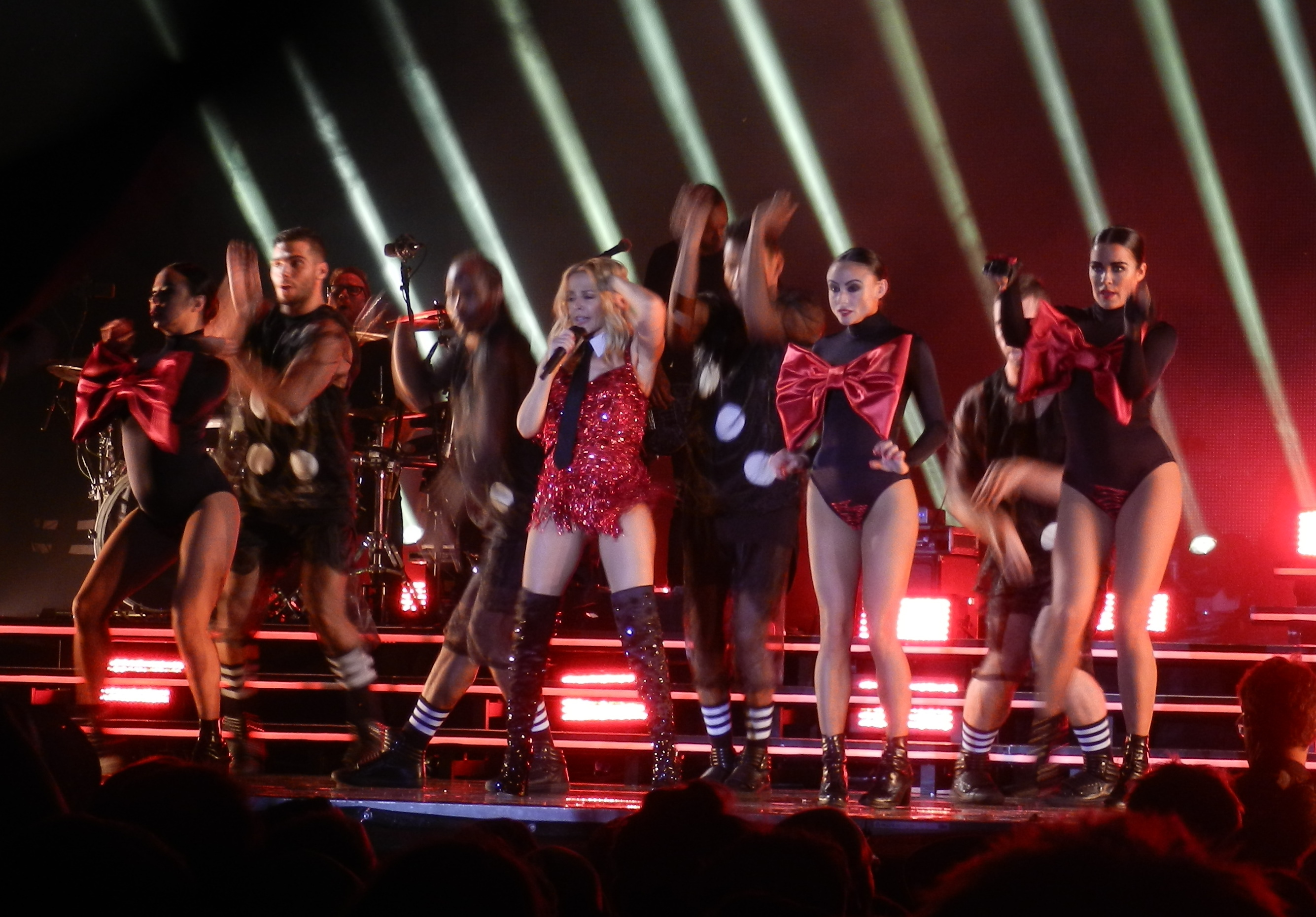 Kylie Minogue (12)